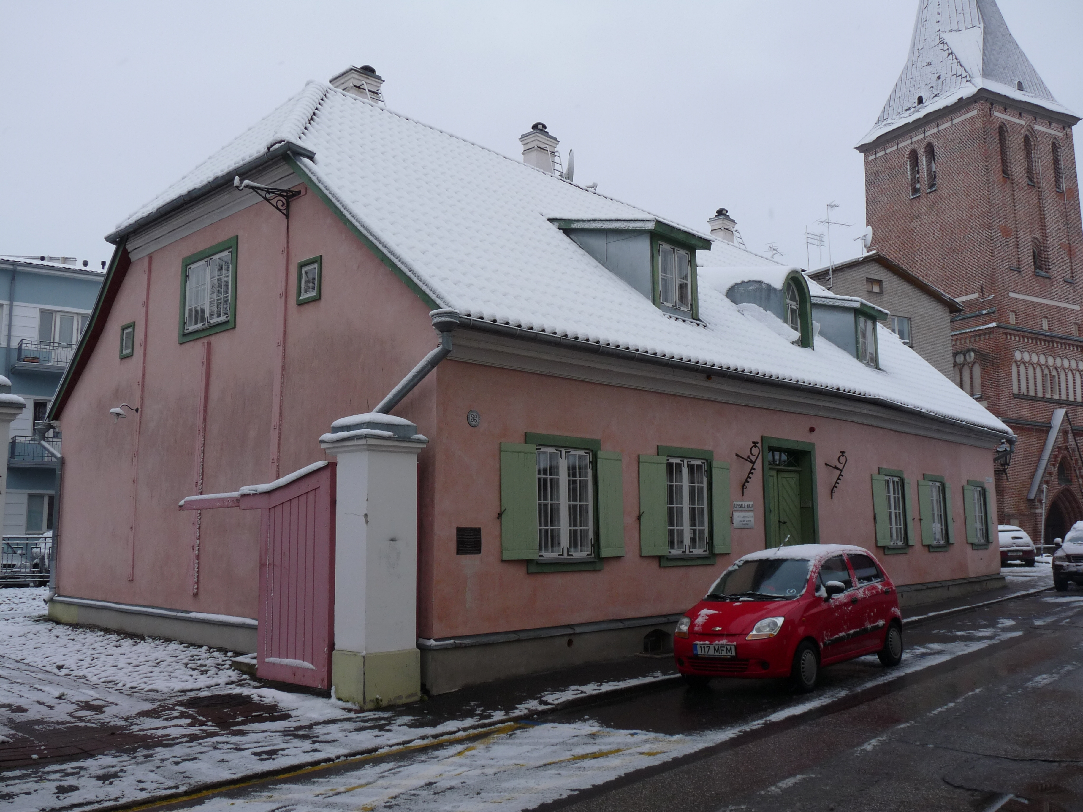 Uppsala maja Tartus Jaani tänaval esimese lumega, 26. oktoober 2012